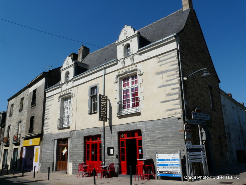 Hôtel du Grand-Monarque (Nozay) (44170)